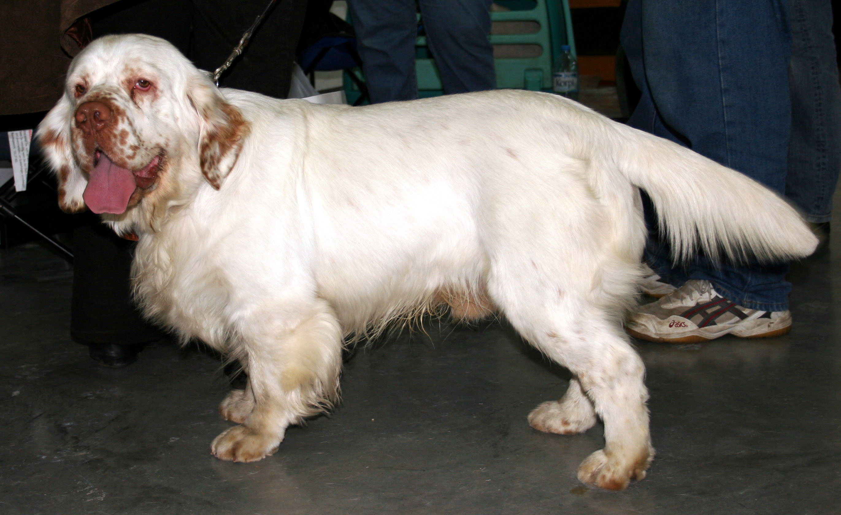 Clumber_spaniel na Światowej Wystawie Psów Rasowych w Poznaniu